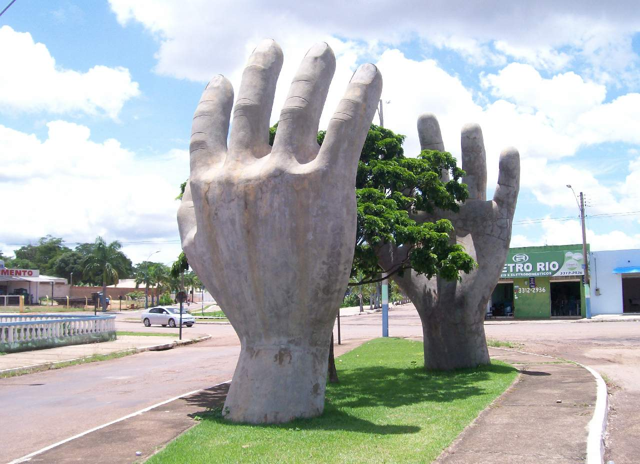 Monumento á Natureza. Gurupi Tocantins, Brasil.